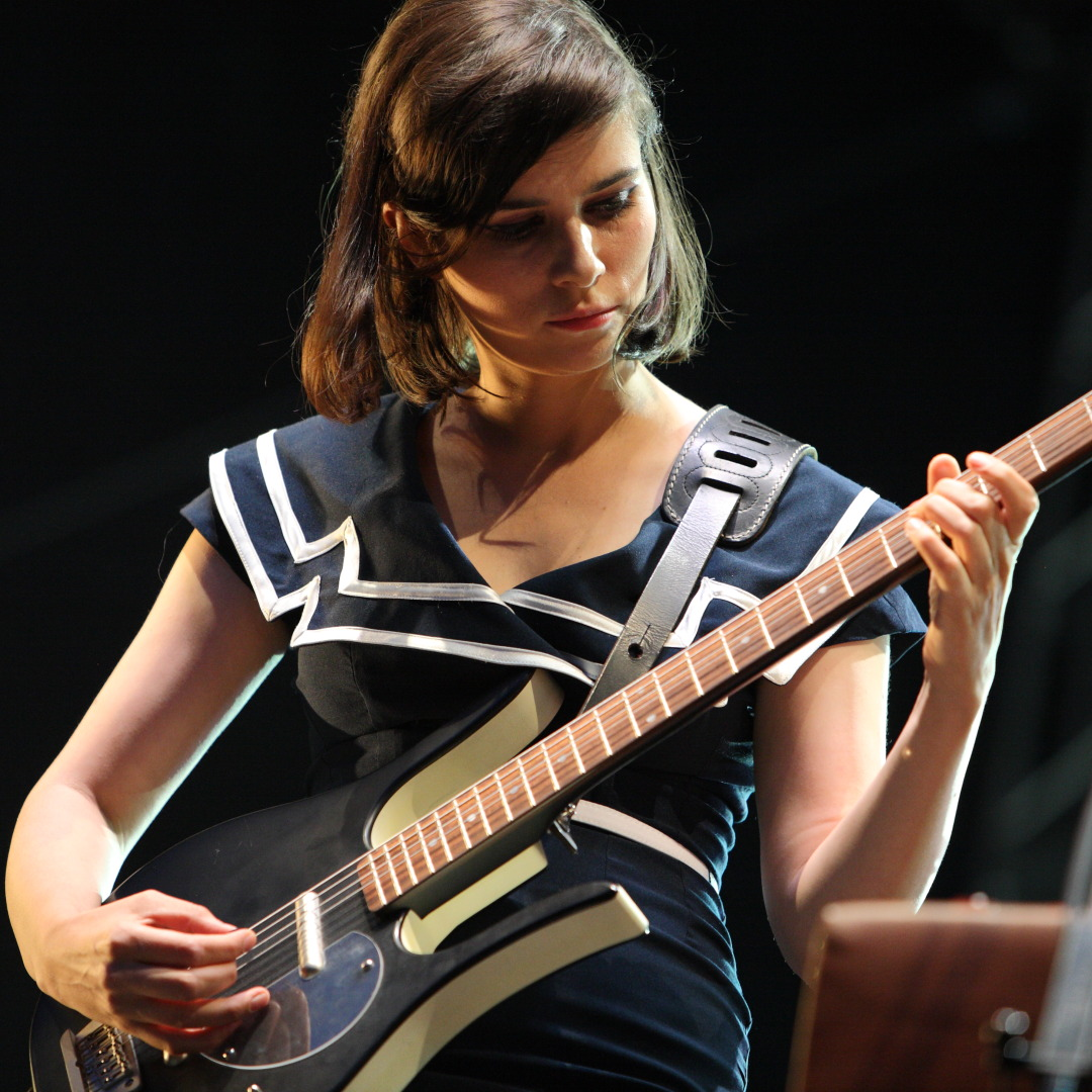 Nora Tschirner von der Band Prag beim Bochumer Musiksommer 2014